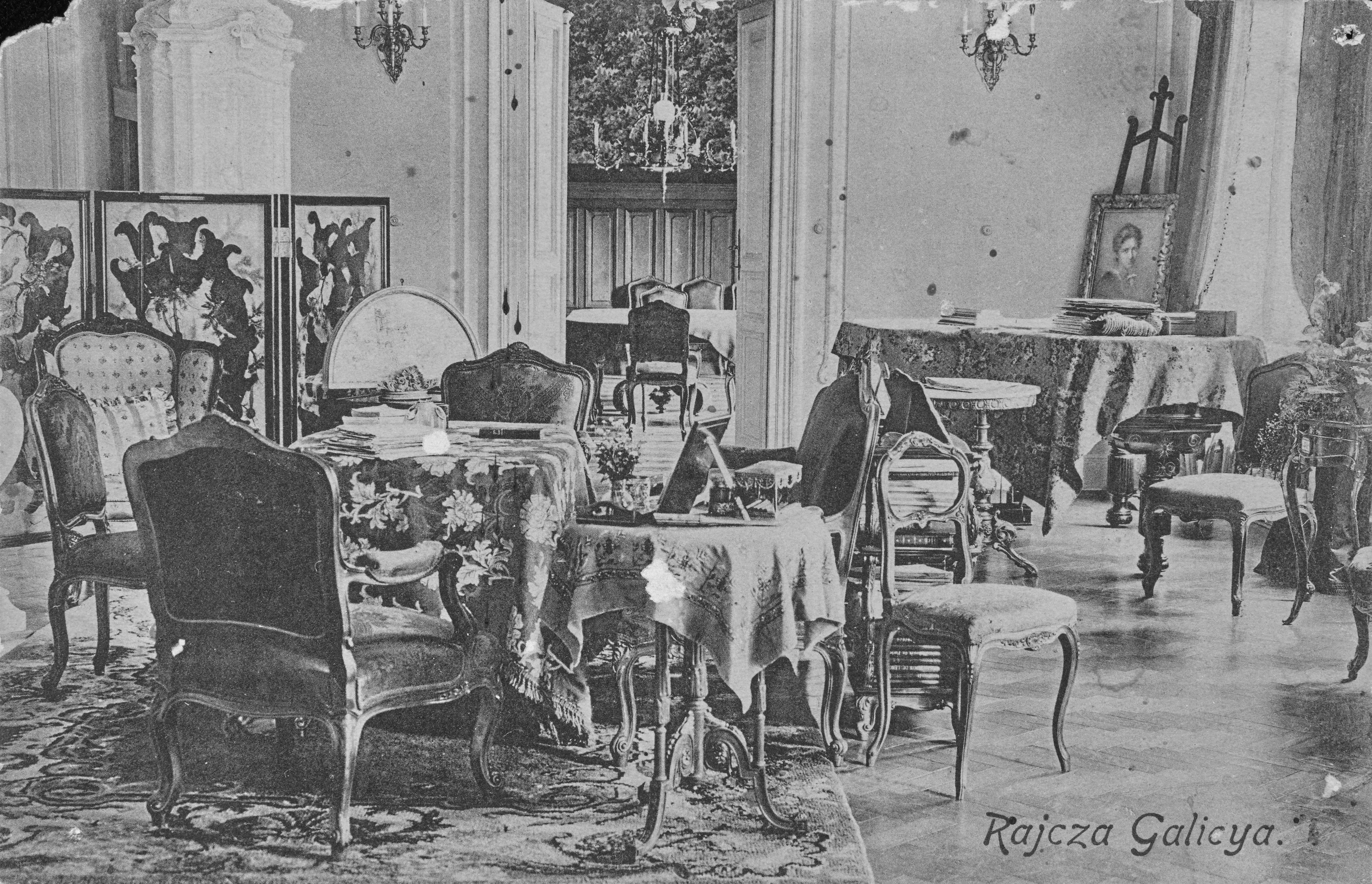 Wnętrze pałacu w Rajczy, pocztówka.